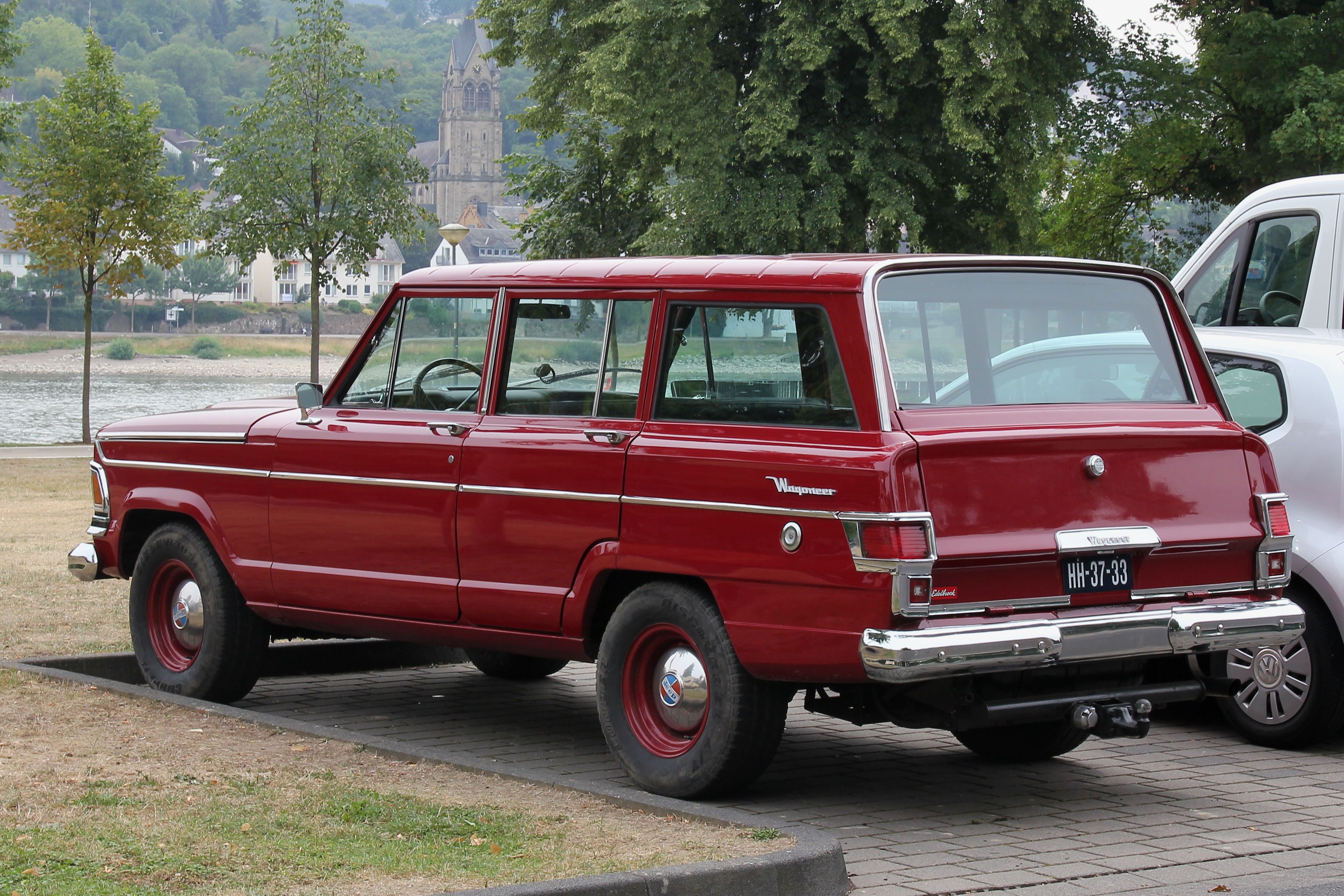 Kaiser-Jeep Wagoneer, Baujahr um 1967/68, wahlweise mit 6-Zylinder-Reihenmotor, 3802 cm³, oder 8-Zylinder-V-Motor, 5358 cm³ (Kennzeichen verändert)